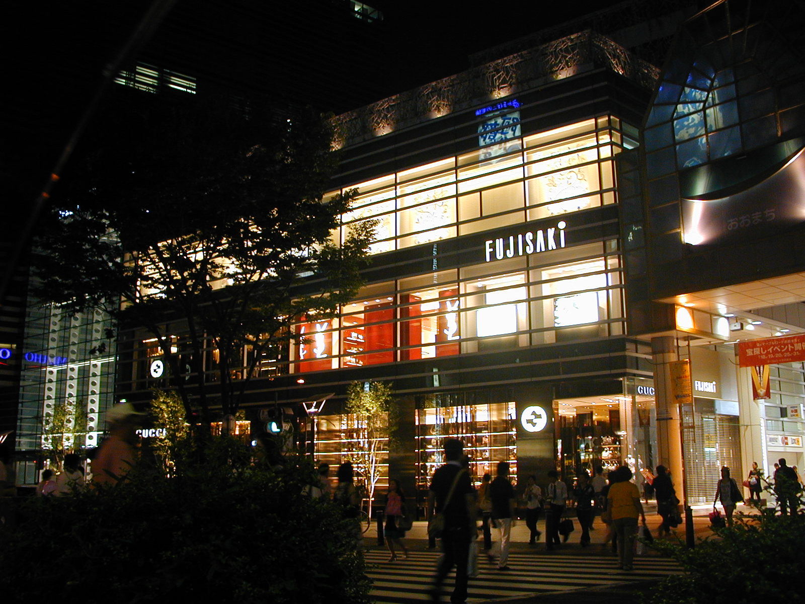 東二番丁から見た藤崎ファーストタワー館。